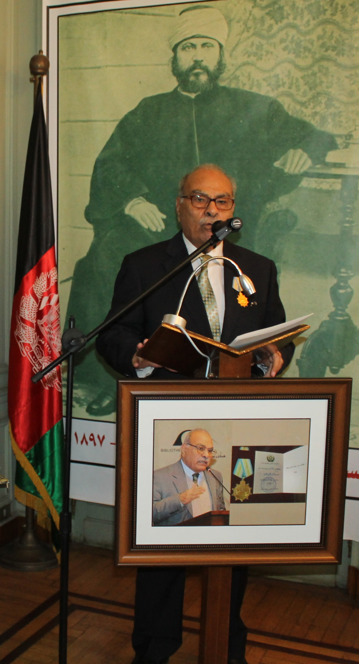 صورة دکتور محمد عمارة فی حفل اهداء مدالیة السید جمال الدین الافغانی لفضیلته فی مقر السفارة الافغانیة بالقاهرة.